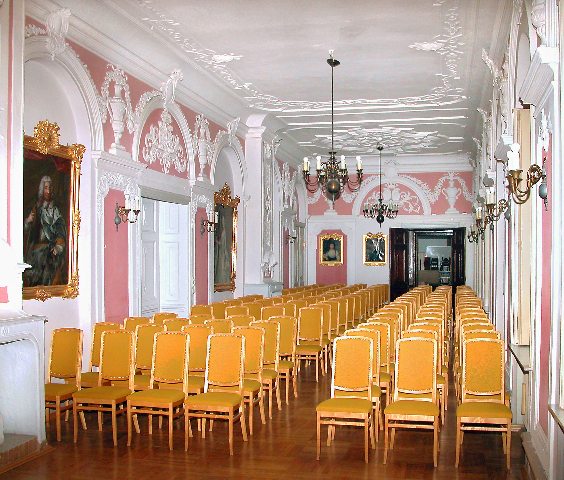 25.06.2004 17495 Karlsburg, Nepziner Weg / Greisfswalder Straße (GMP: 53.970552,13.610214): Barockschloß (1732). Bis 1945 im Besitz der Adelsfamilie von Bismarck-Bohlen und anschließend in der DDR bis 1990 Teil des in Karlsburg ansässigen Zentralinstitutes für Diabetes. Seitdem gehört es dem Land Mecklenburg-Vorpommern und wird durch die Universität Greifswald verwaltet. Hier befinden sich Institute und ein privates Klinikum. Festsaal (Vortragssaal) im Erdgeschoß. [DSCN4179.JPG]20040625120DR.JPG(c)Blobelt